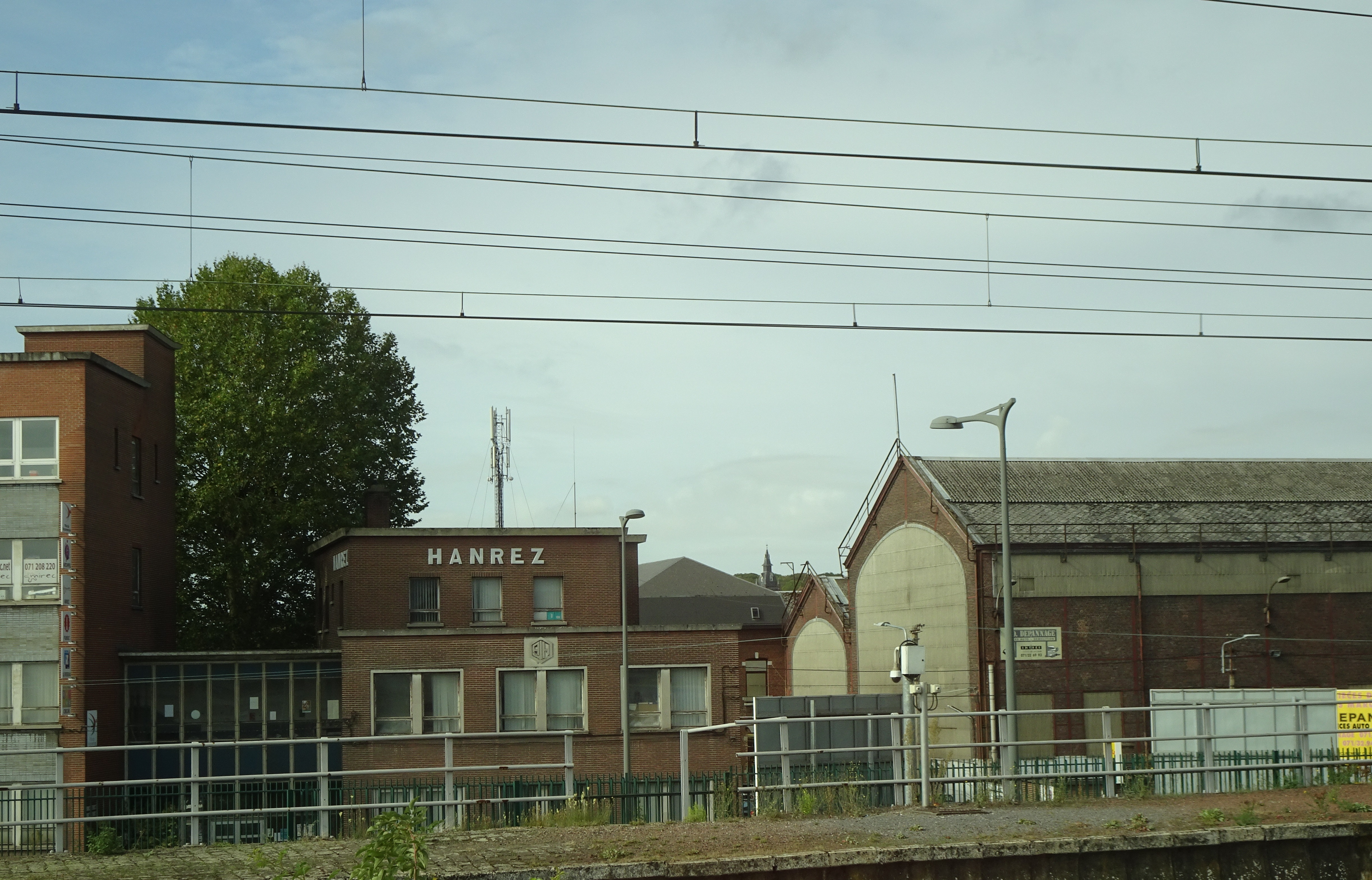 Ancienne usine Hanrez, vue depuis un train en marche, près de la gare de Marchienne-au-Pont